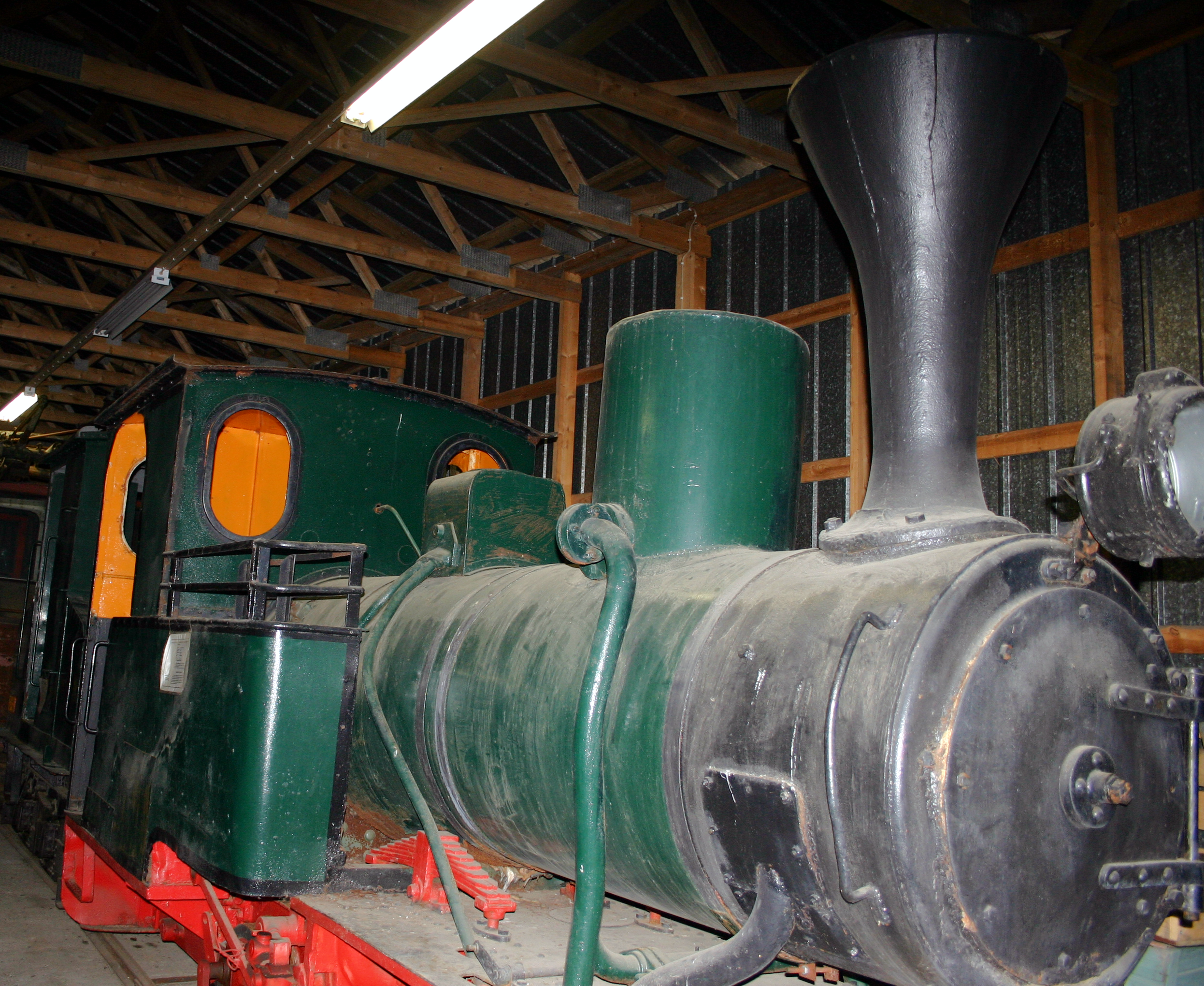 Åminneforsin radan veturi